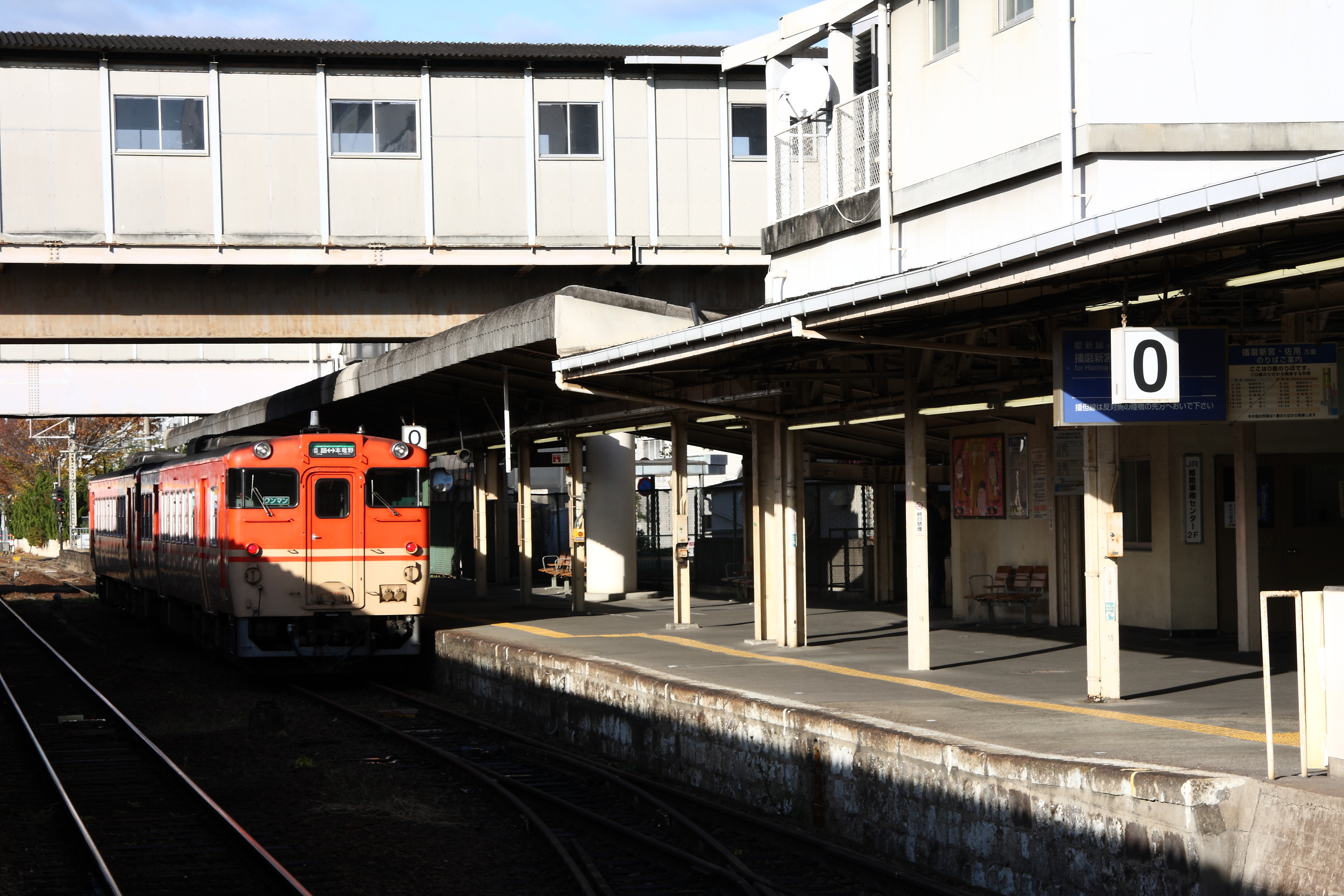 地上駅時代の姫路駅 姫新線乗り場（0番線）